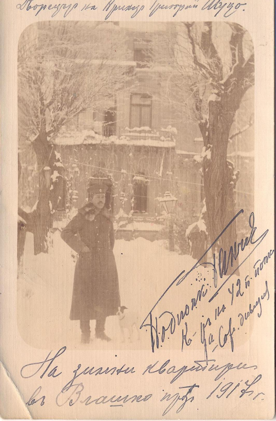 Снимка на подполковник Александър Ганчев, командир на 42-и пехотен полк, на зимни квартири във Влашко през 1917 г.